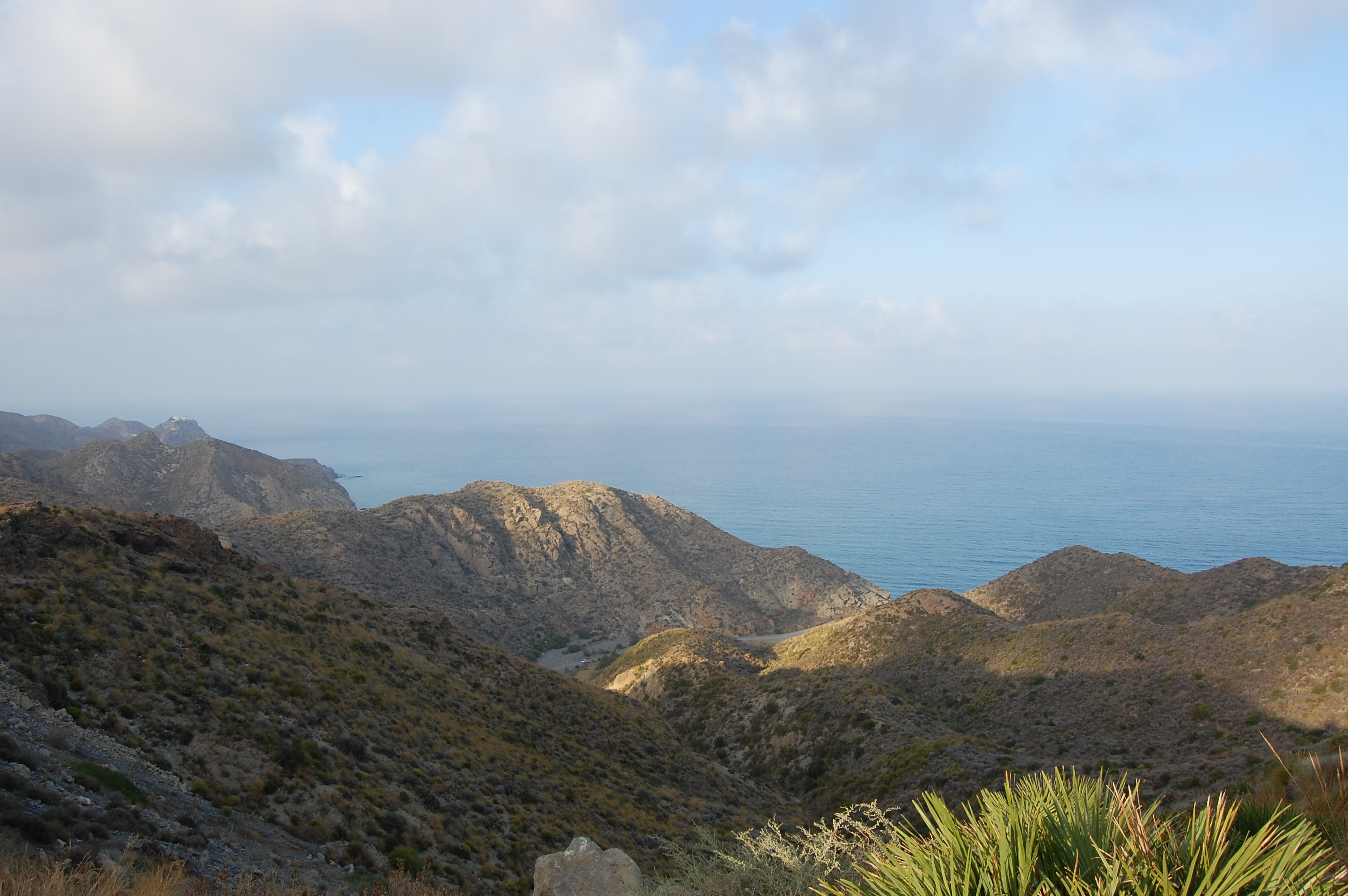 Relieve en torno a Carboneras